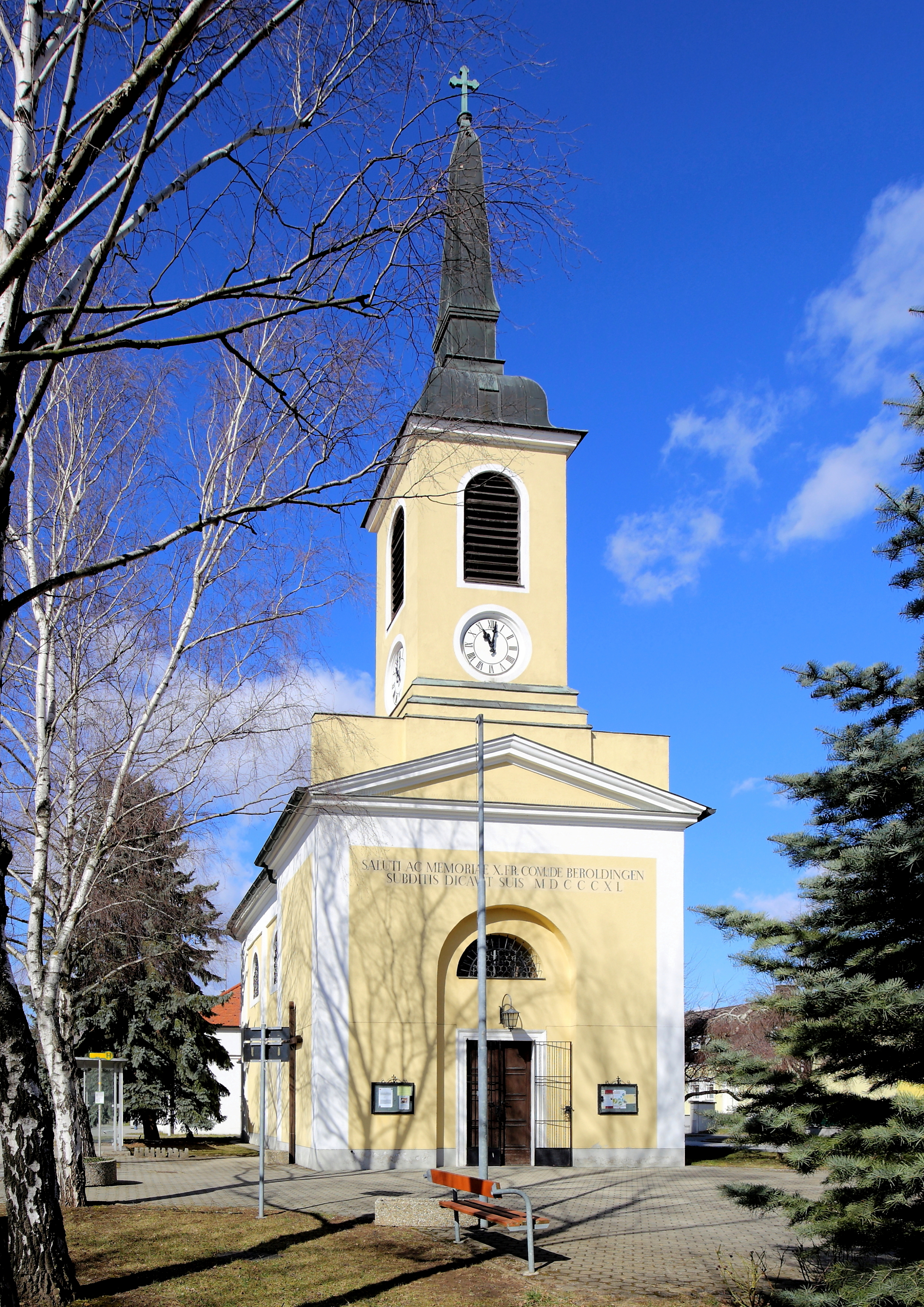 Südostansicht der katholischen Pfarrkirche hl. Rosalia auf dem Anger in Seyring, ein Ortsteil der niederösterreichischen Stadt Gerasdorf bei Wien. Die frühbarocke Kirche wurde um 1670 errichtet. Im Jahr 1840 wurde im Südosten eine Vorhalle mit Turm sowie im Nordwesten eine Sakristei angebaut.